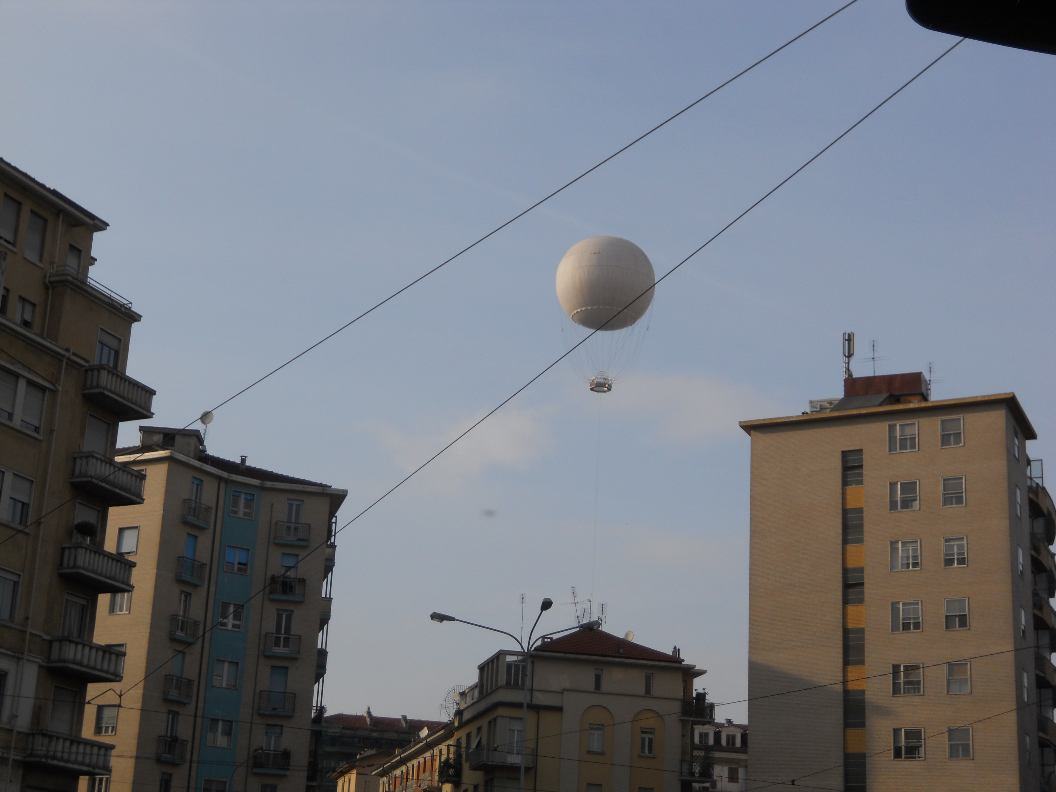 Il pallone aerostatico sopra il Balon